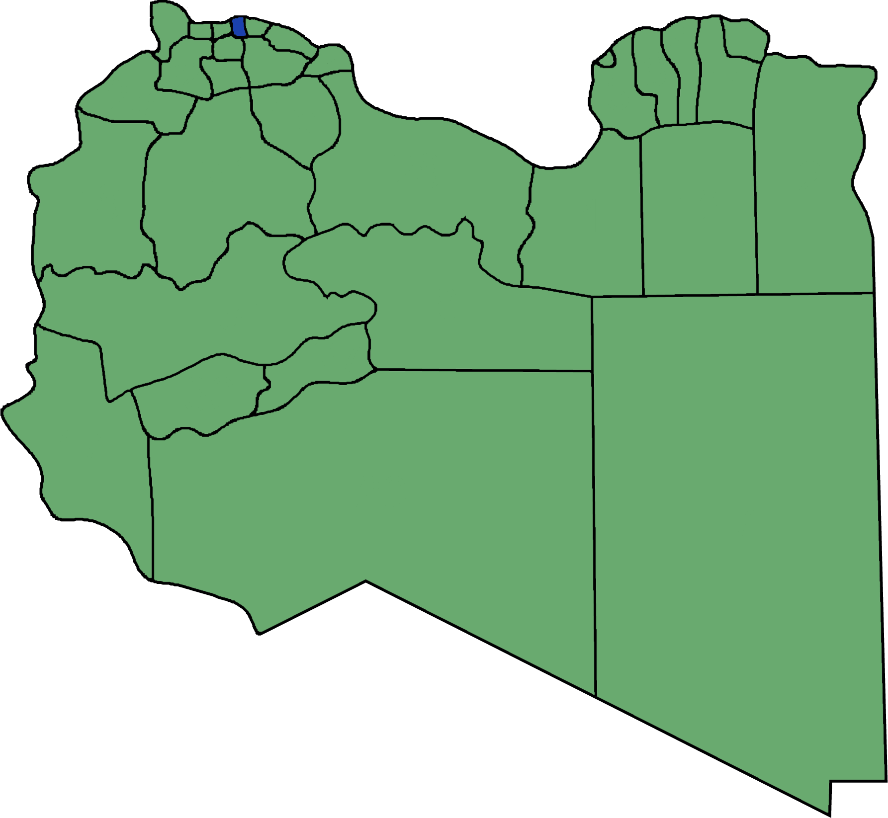 Die neuen Gemeinden (Munizipien) in Libyen. Tarabulus hervorgehoben.